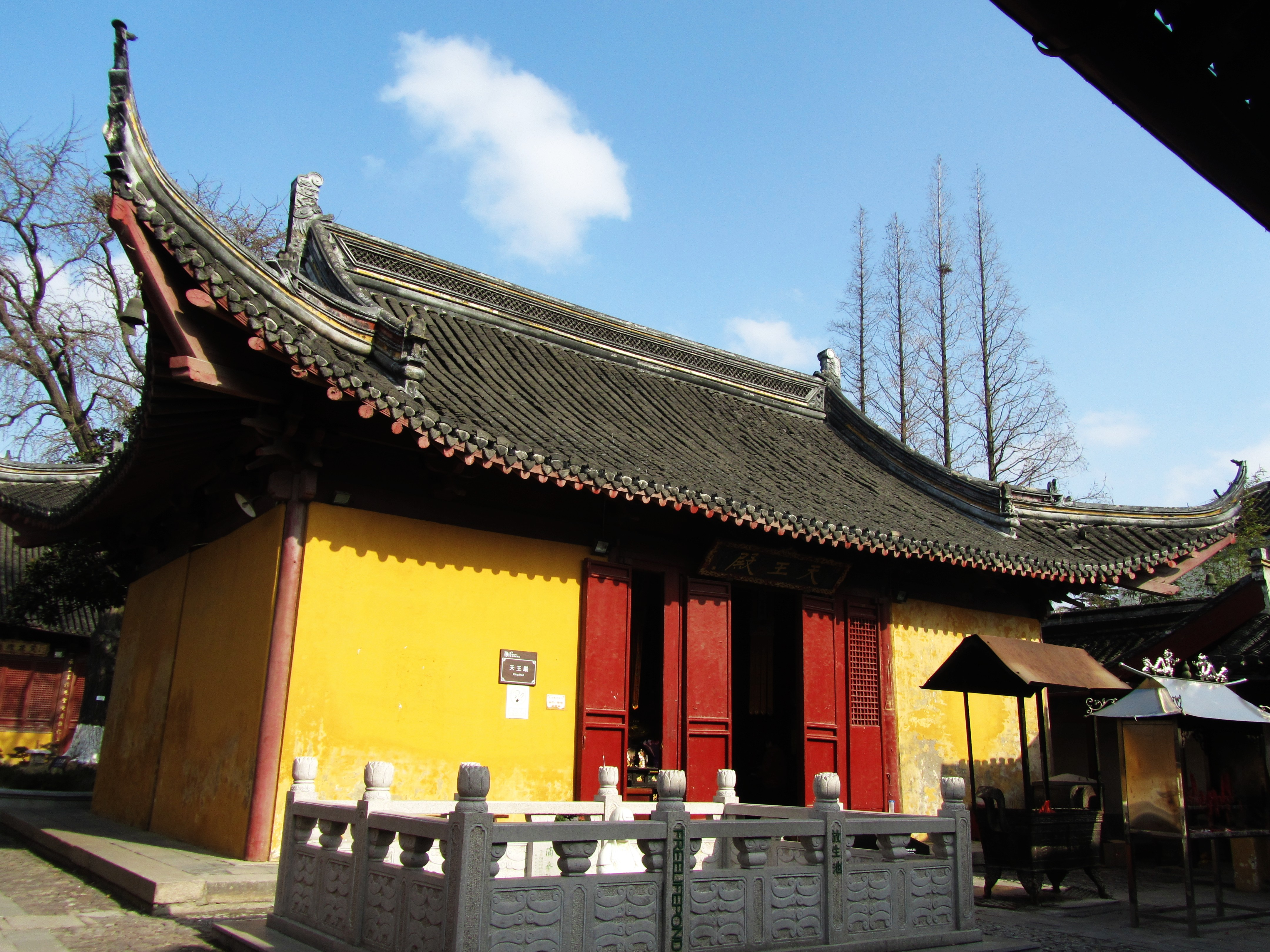 南通天宁寺，天王殿。